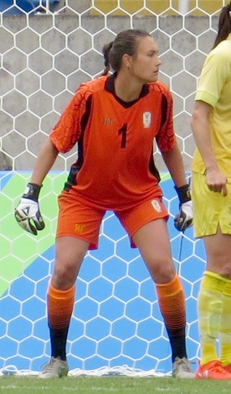 Futebol feminino Suécia 1 x0 Africa do Sul 03/08/16